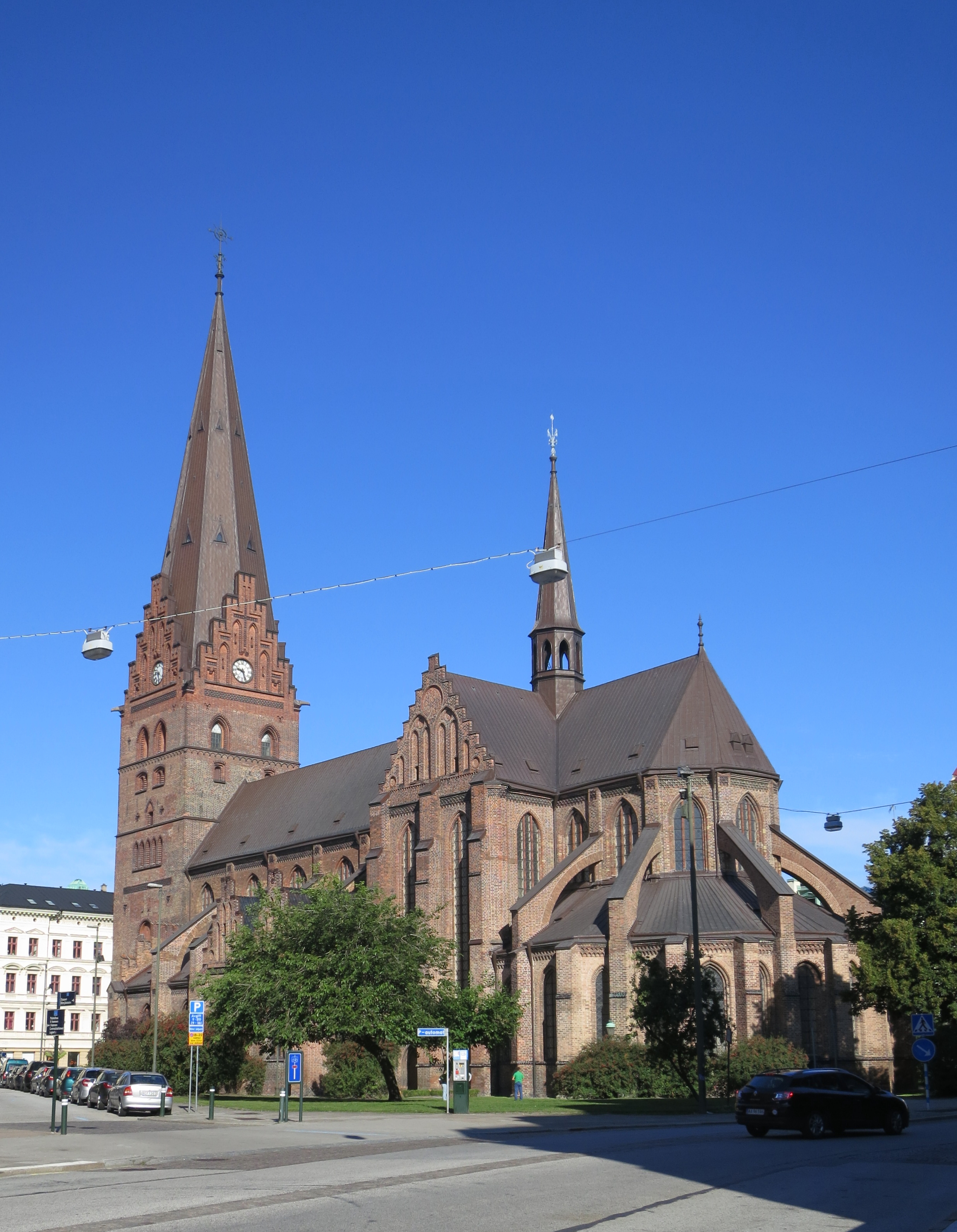 Sankt Petri kyrka, Malmö, augusti 2013